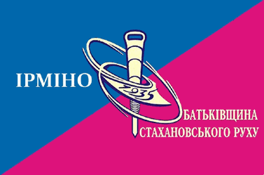 Прапор Ірміного